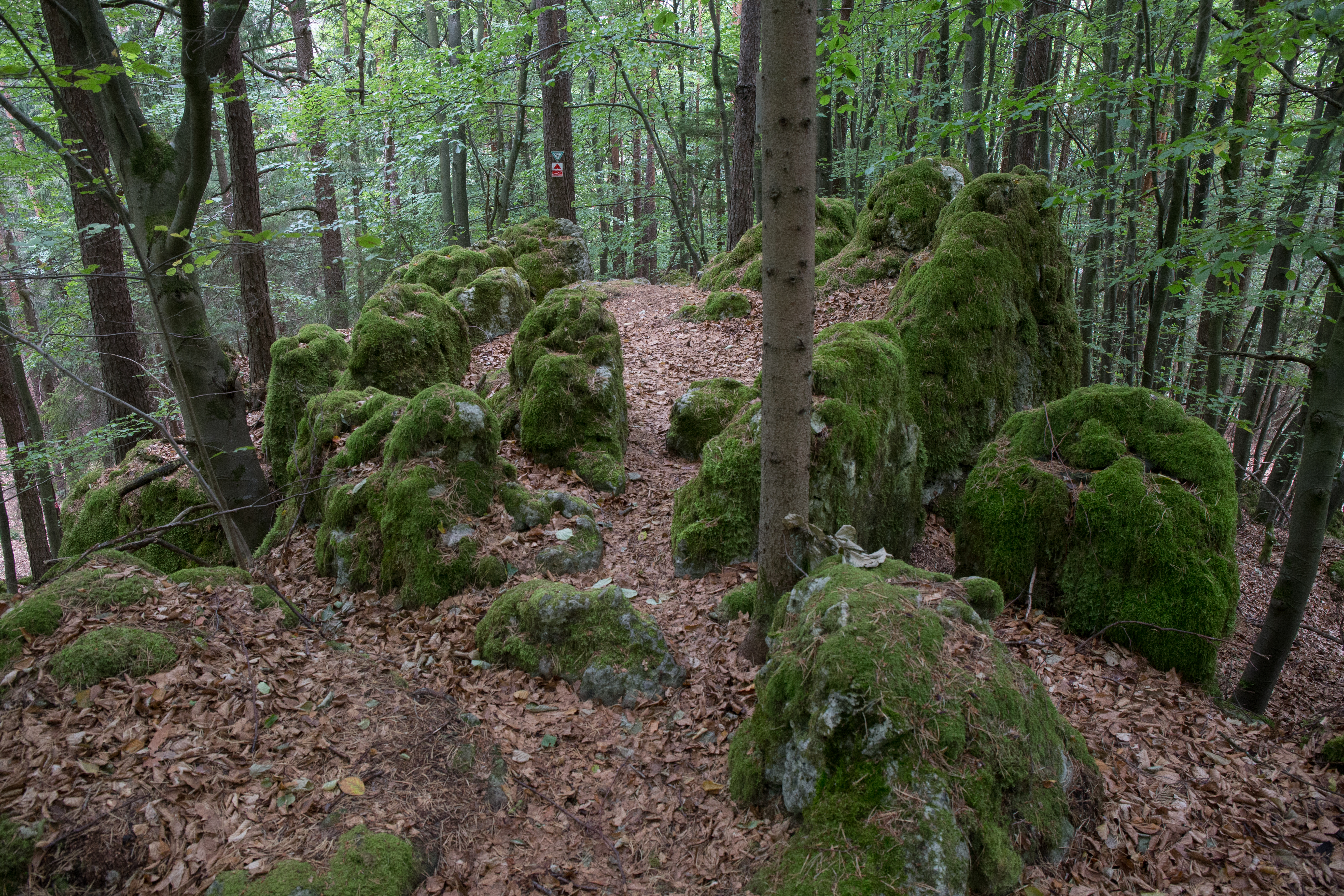 Naturdenkmal Judenfriedhof bei Plech